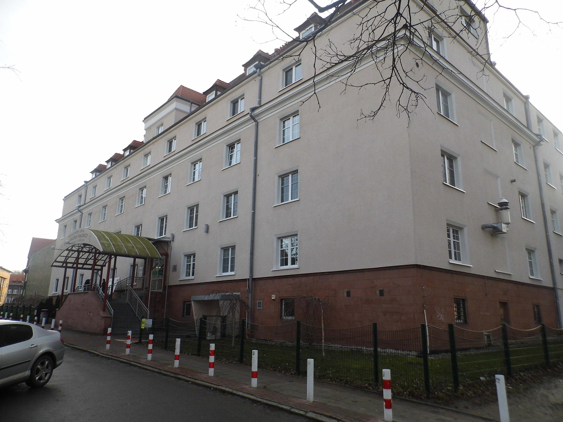 Wałbrzych Nowe Miasto, ul. Paderewskiego 10 - Szpital Ginekologiczno Położniczy